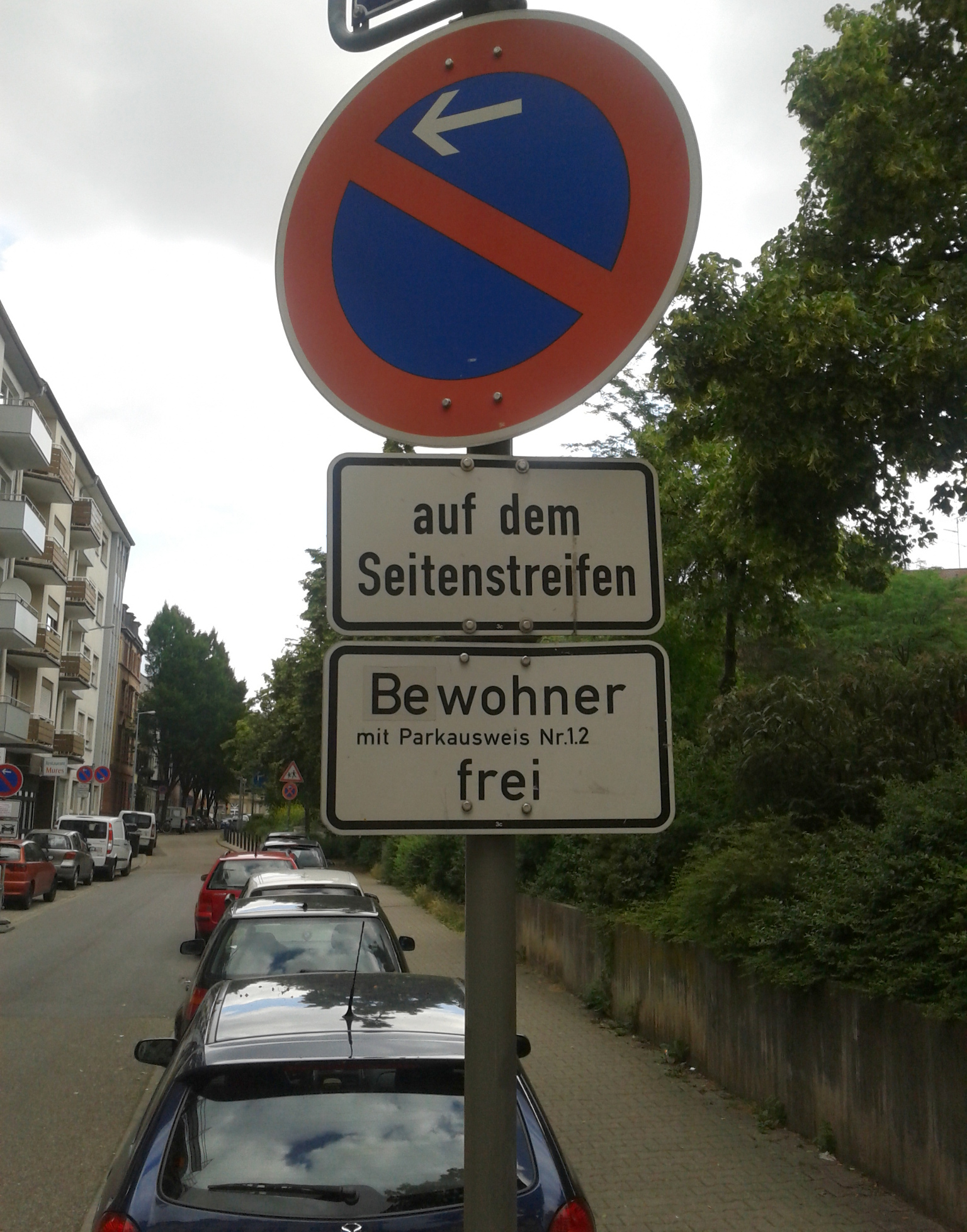 Bewohnerparken in Mannheim E6/E7